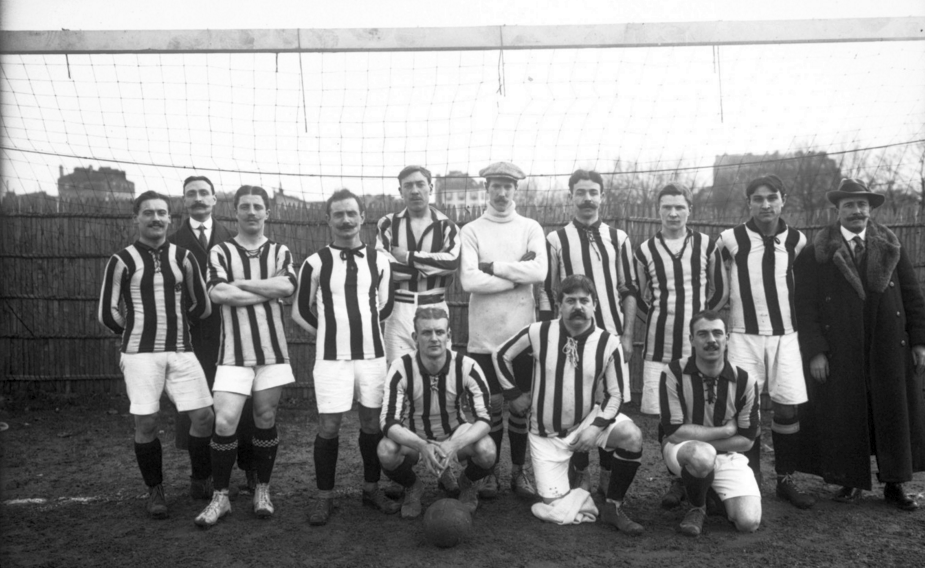 Equipe du Club français, club parisien de football en 1913